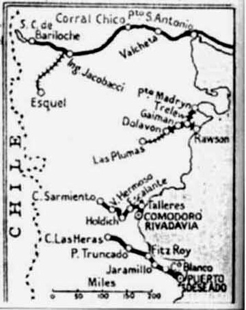 Map of Patagonian railway network c. 1960, consisting of Central Chubut, La Trochita (Ing. Jacobacci–Esquel), Comodoro Rivadavia, and Puerto Deseado railways. All of them currently belongs to General Roca Railway network.